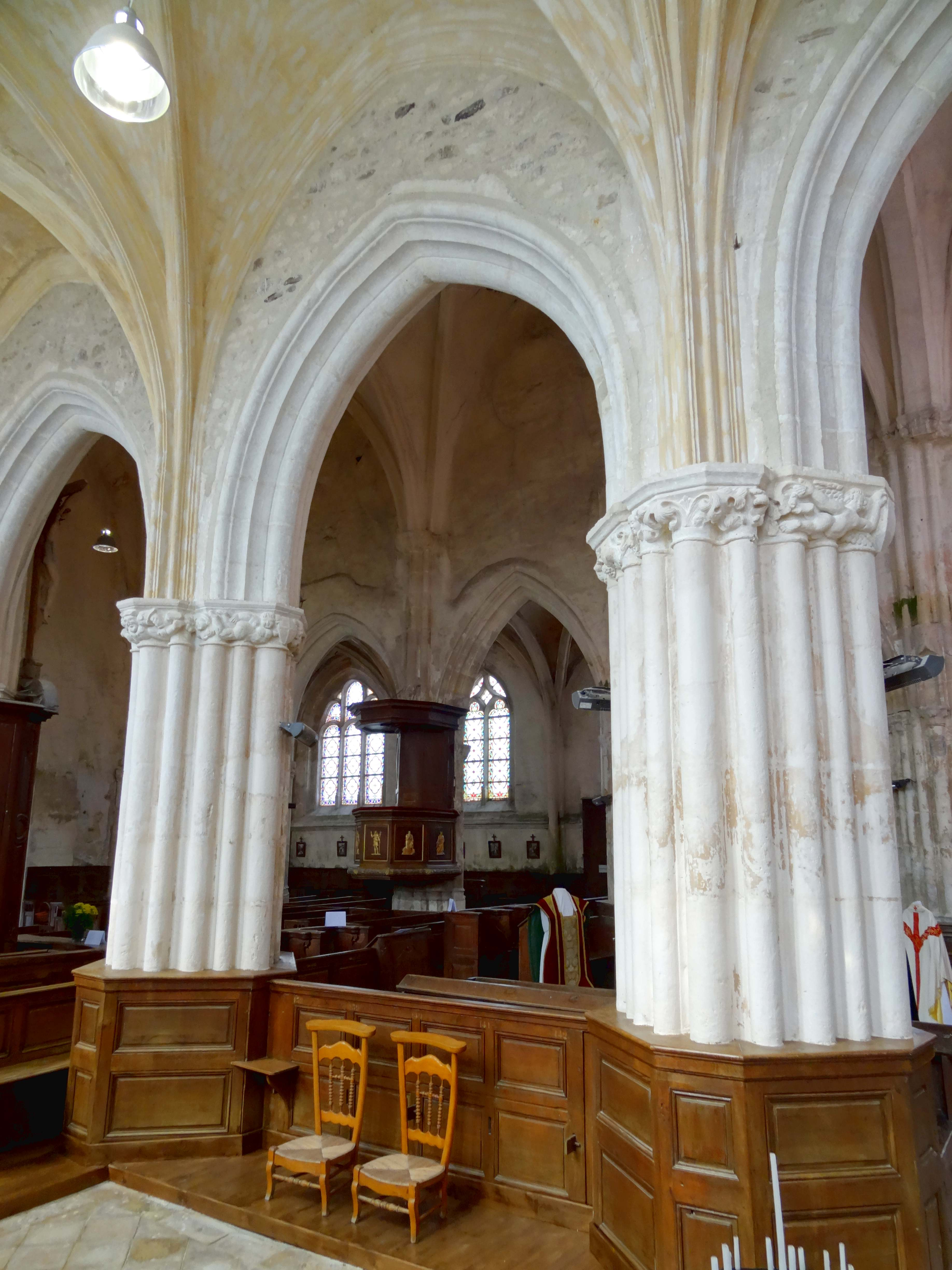 Intérieur de l'église - voir titre.